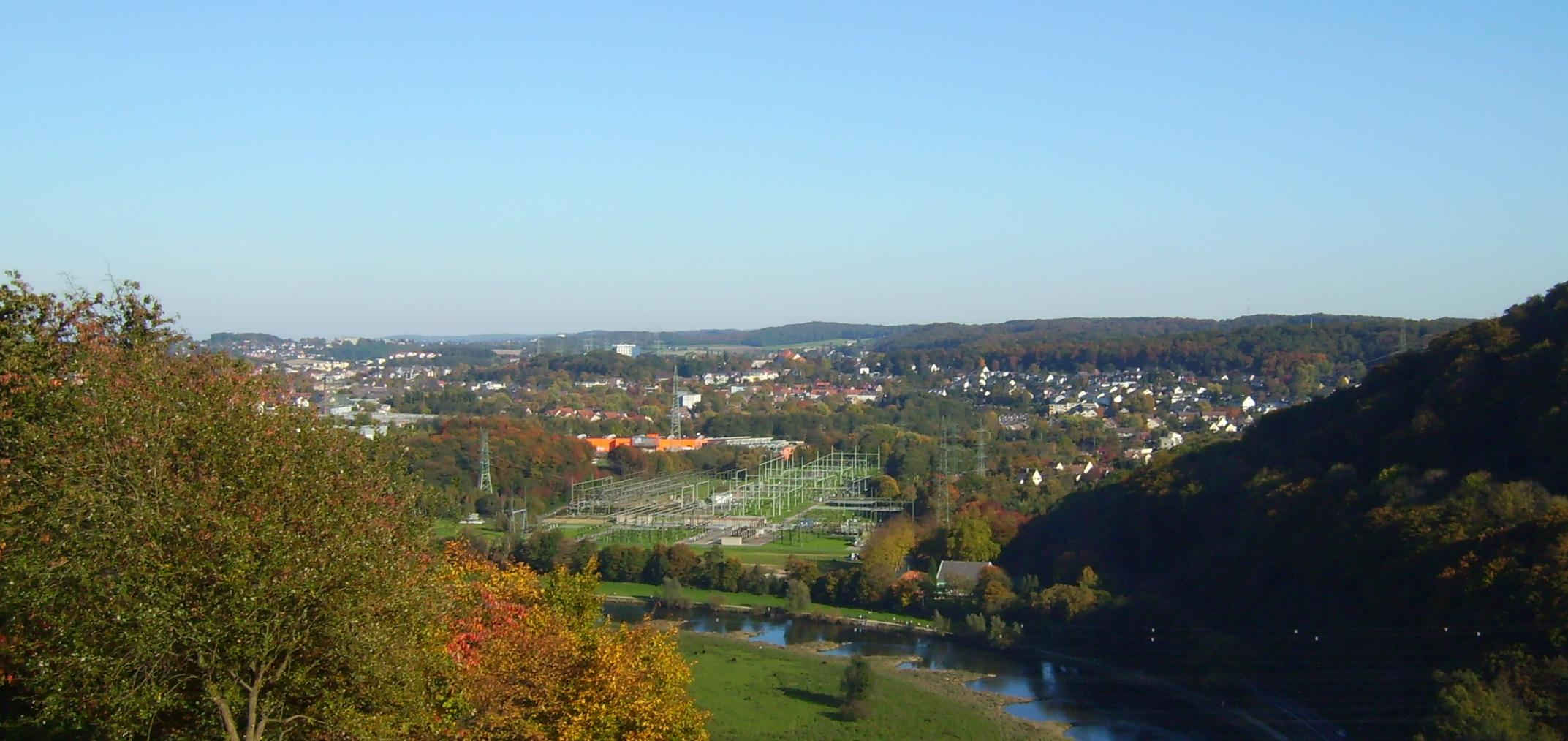 Hattingen von der Isenburg aus gesehen, Ruhraue im Vordergrund, hinten Umspannwerk Hattingen